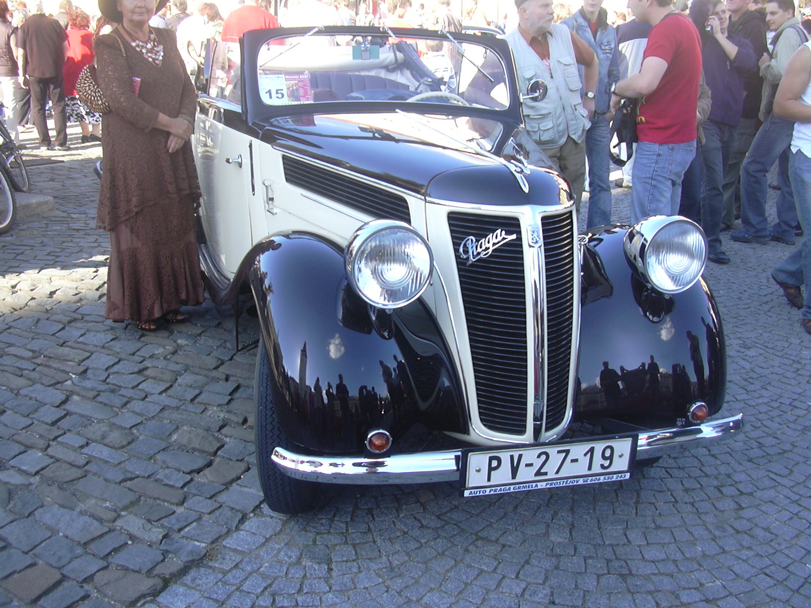 Praga vehicles